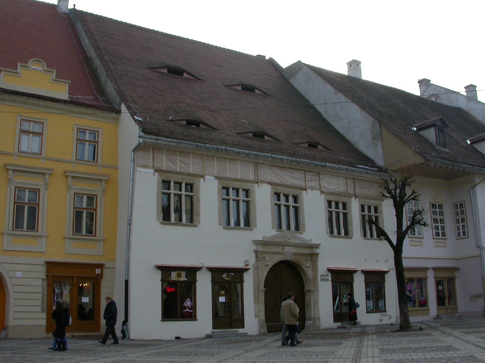 Casa Haller, azi locuințe și spațiu comercial, sec. XV - XVI, sec. XX